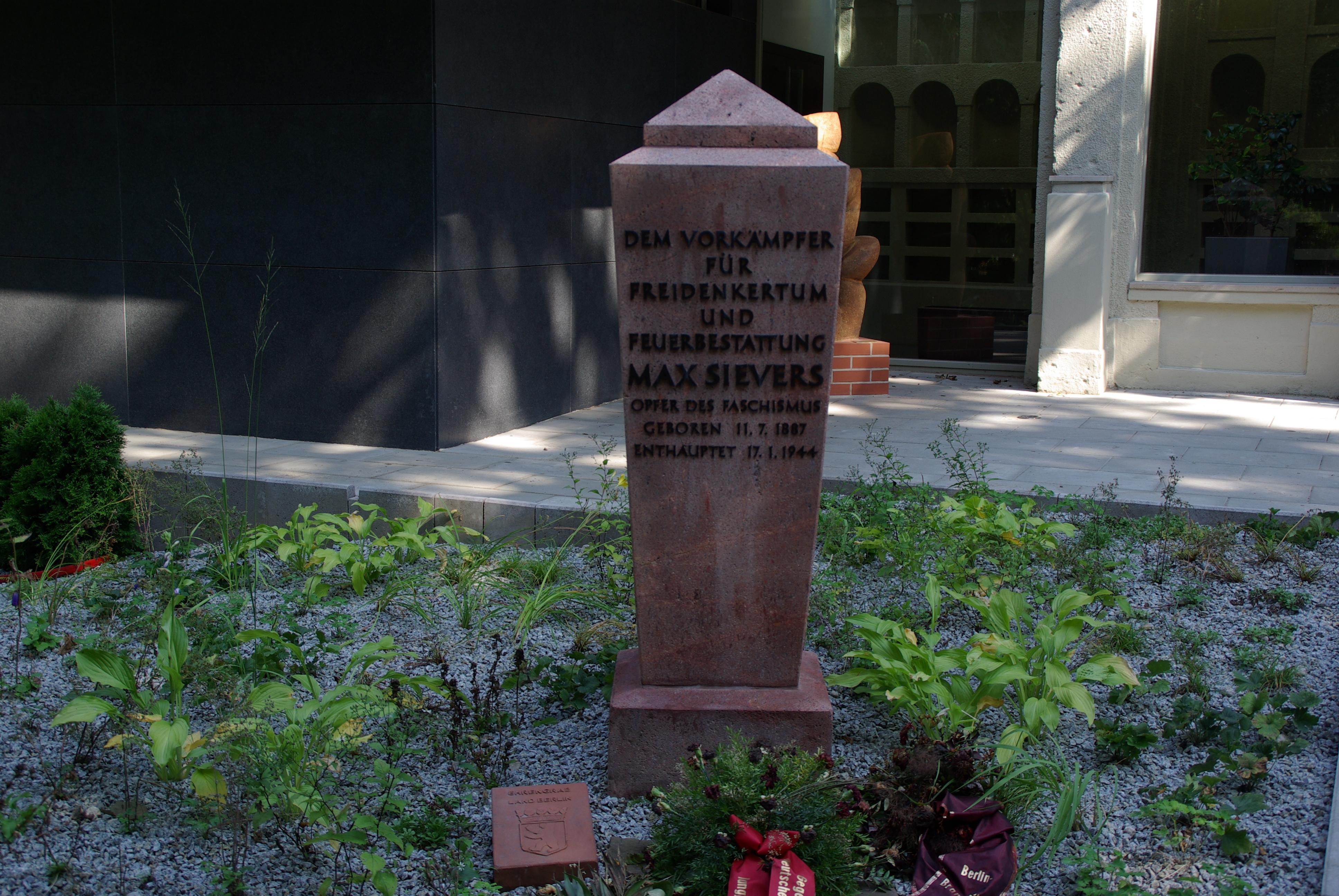 Berlin-Wedding. Der Urnenfriedhof in Berlin-Wedding steht unter Denkmalschutz.